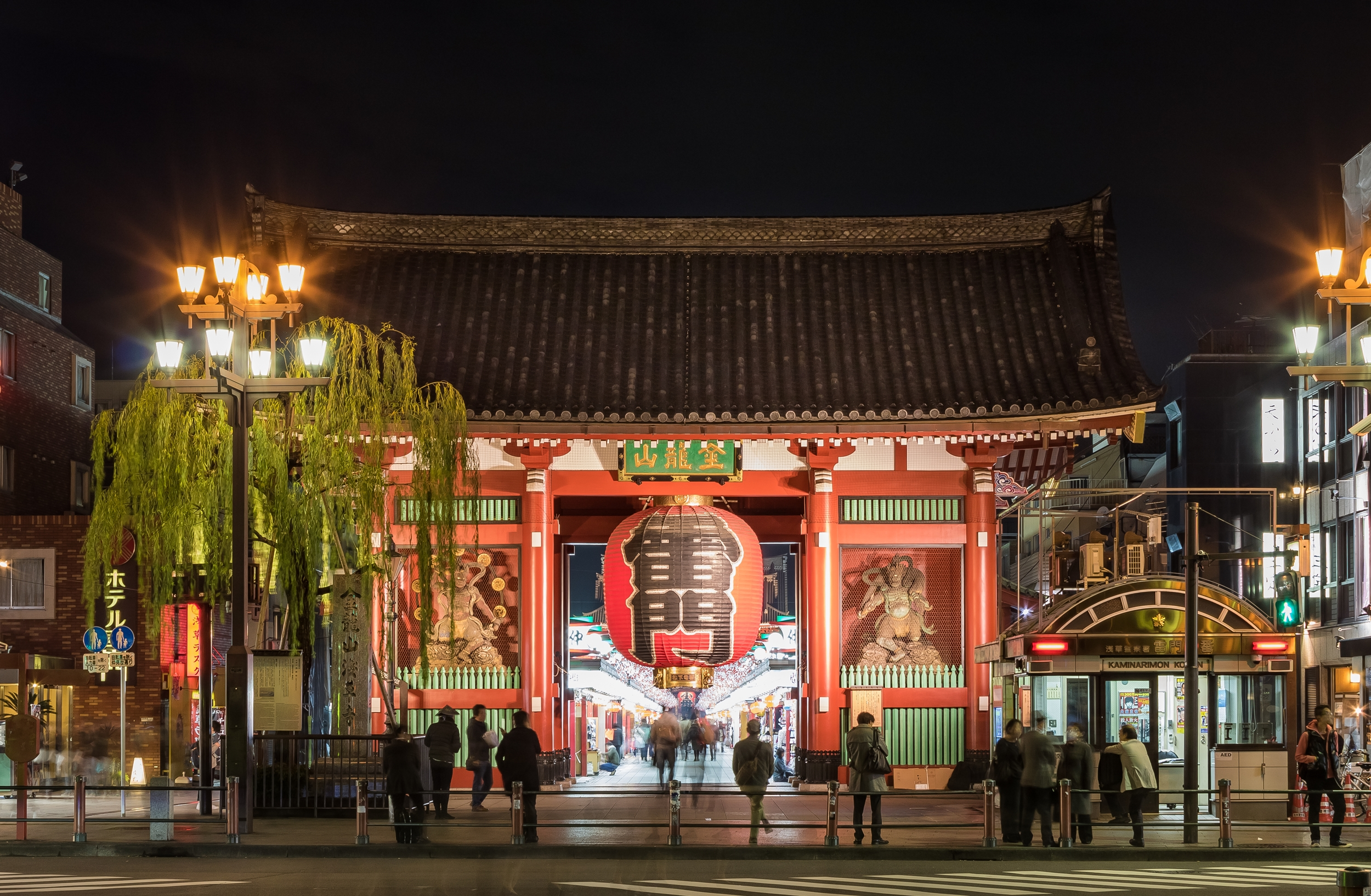 浅草寺雷門のライトアップ